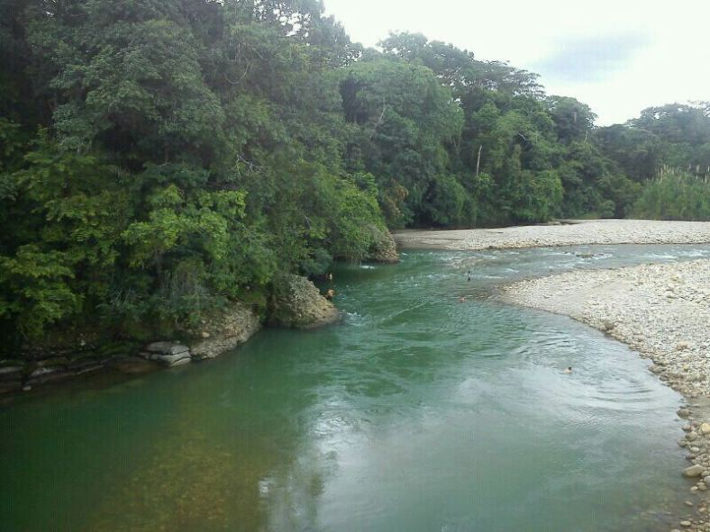 rio Tùa